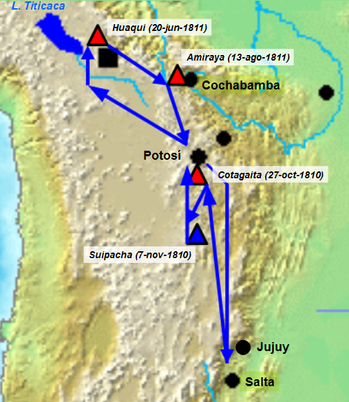 Mapa del Ejército del Norte (1810-1820). Ubicación del Alto Perú